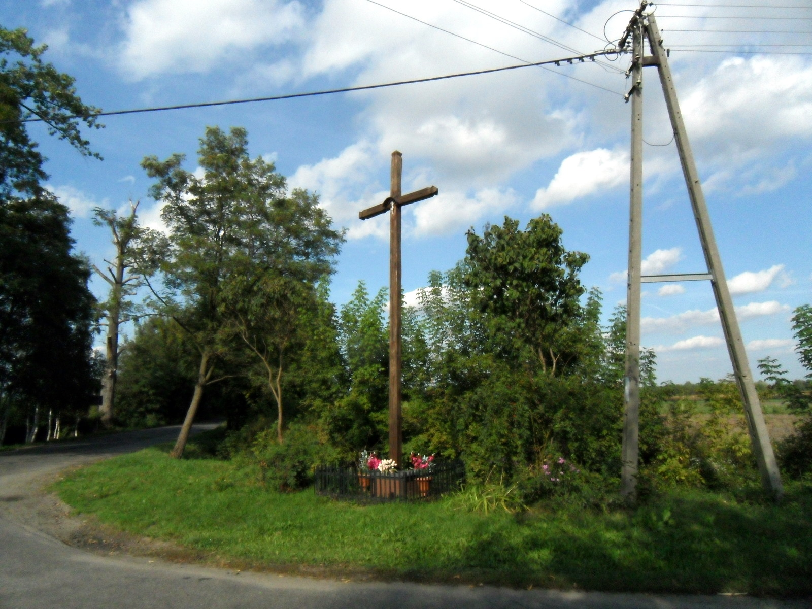 Falęcin